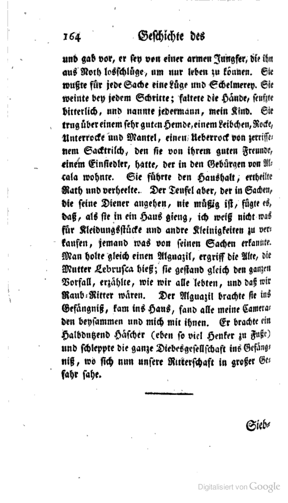 Beleg des Begriffs Raub-Ritter im Magazin der Spanischen und Portugiesischen Literatur 2, Dessau 1781, S. 164